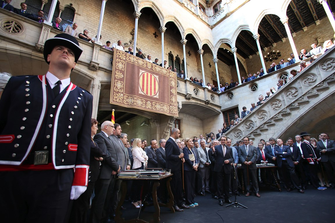 Els alcaldes donen suport al President Mas